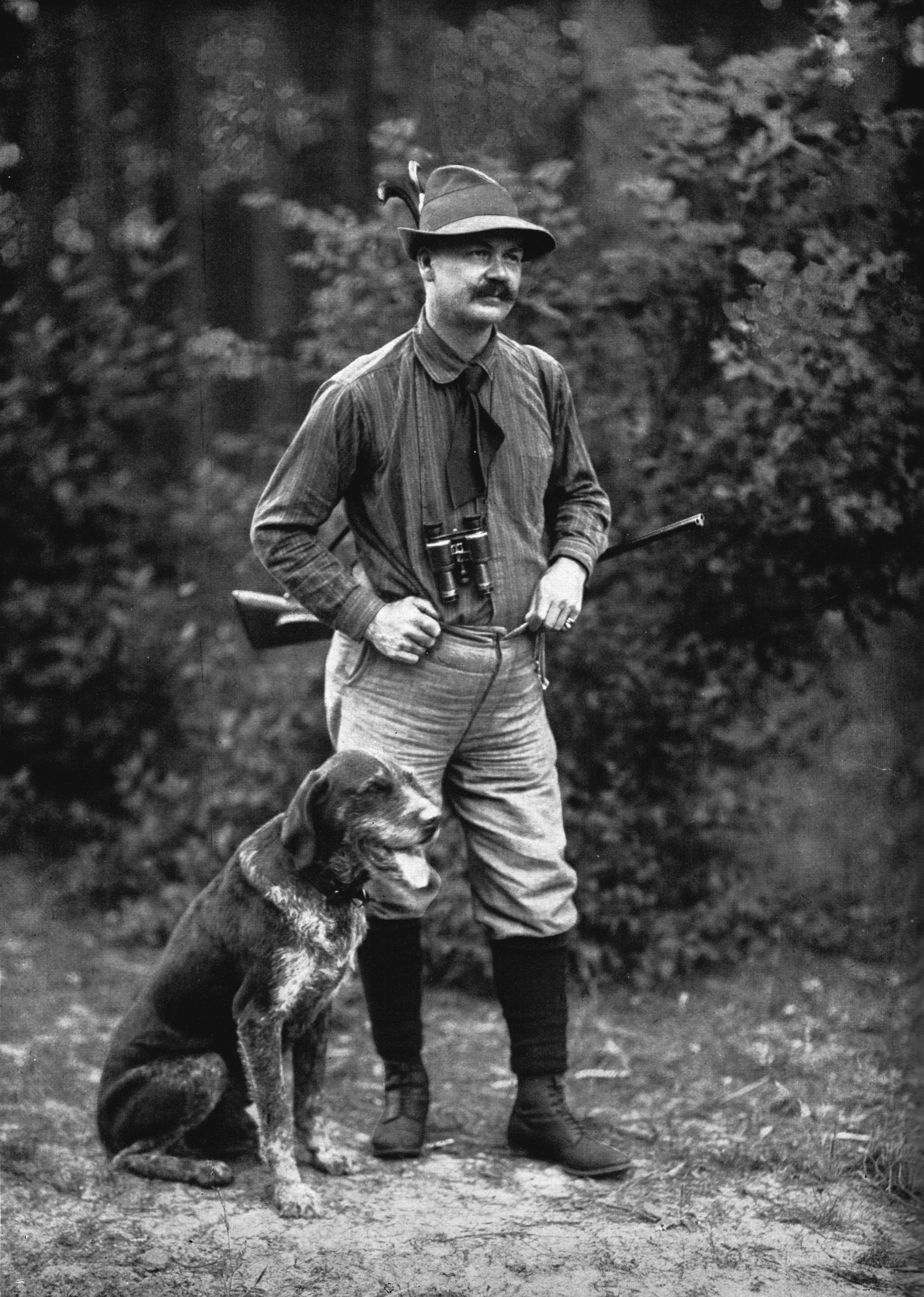 El escritor Ricardo Skowronnek, 49, vestido de cazador con su perro.